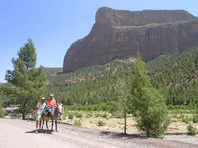 Morocco55